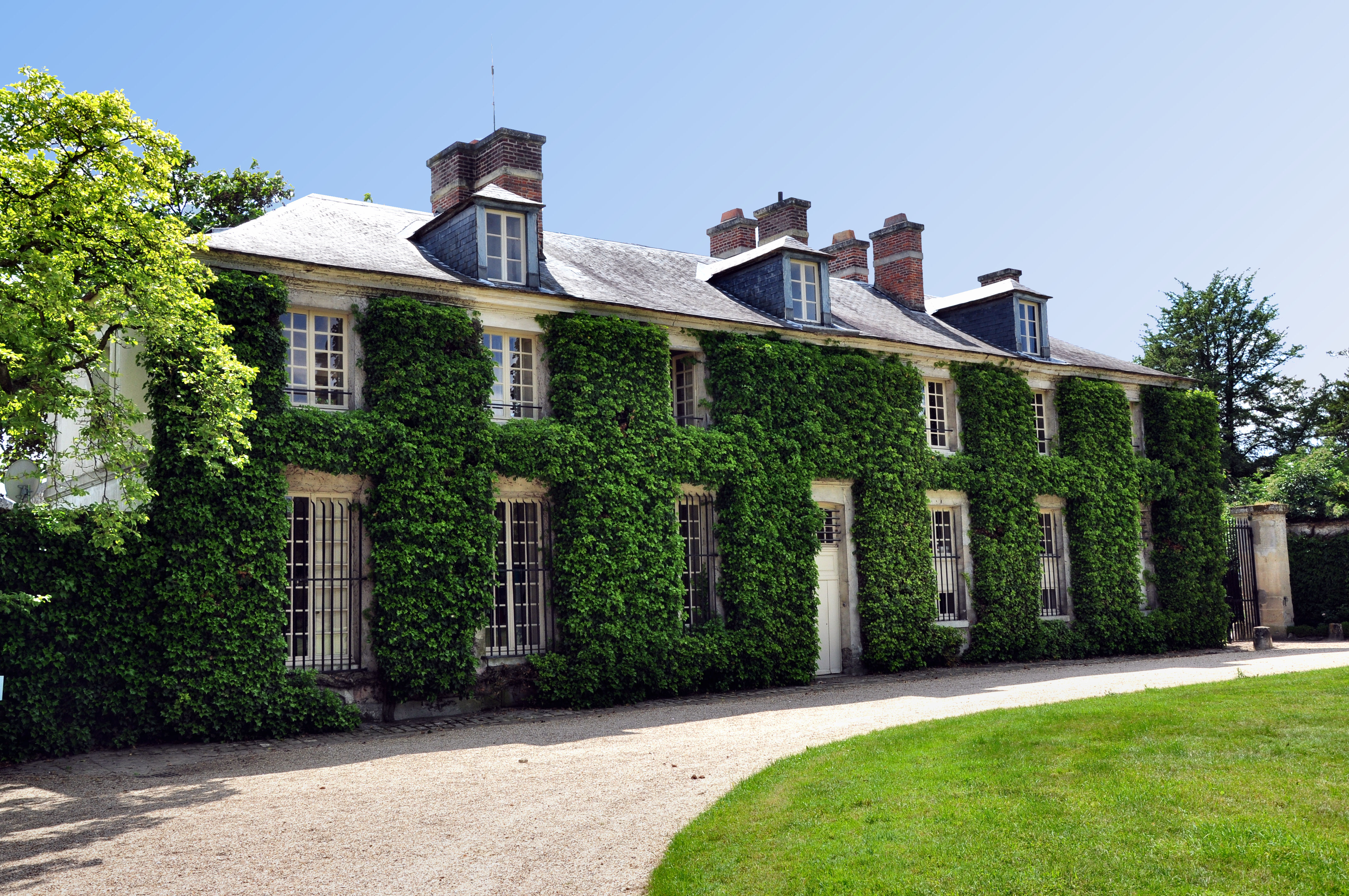 Maison de Richard, domaine du Petit Trianon (Versailles) aussi nommée "Pavillon de Jussieu"